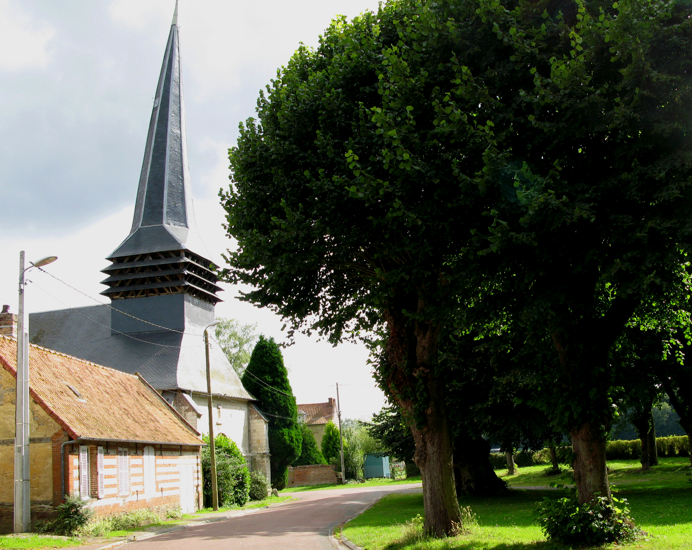 Quevauvillers (Somme, France) - L'église et la place vues en venant du château. La flèche du clocher est légèrement tordue. .